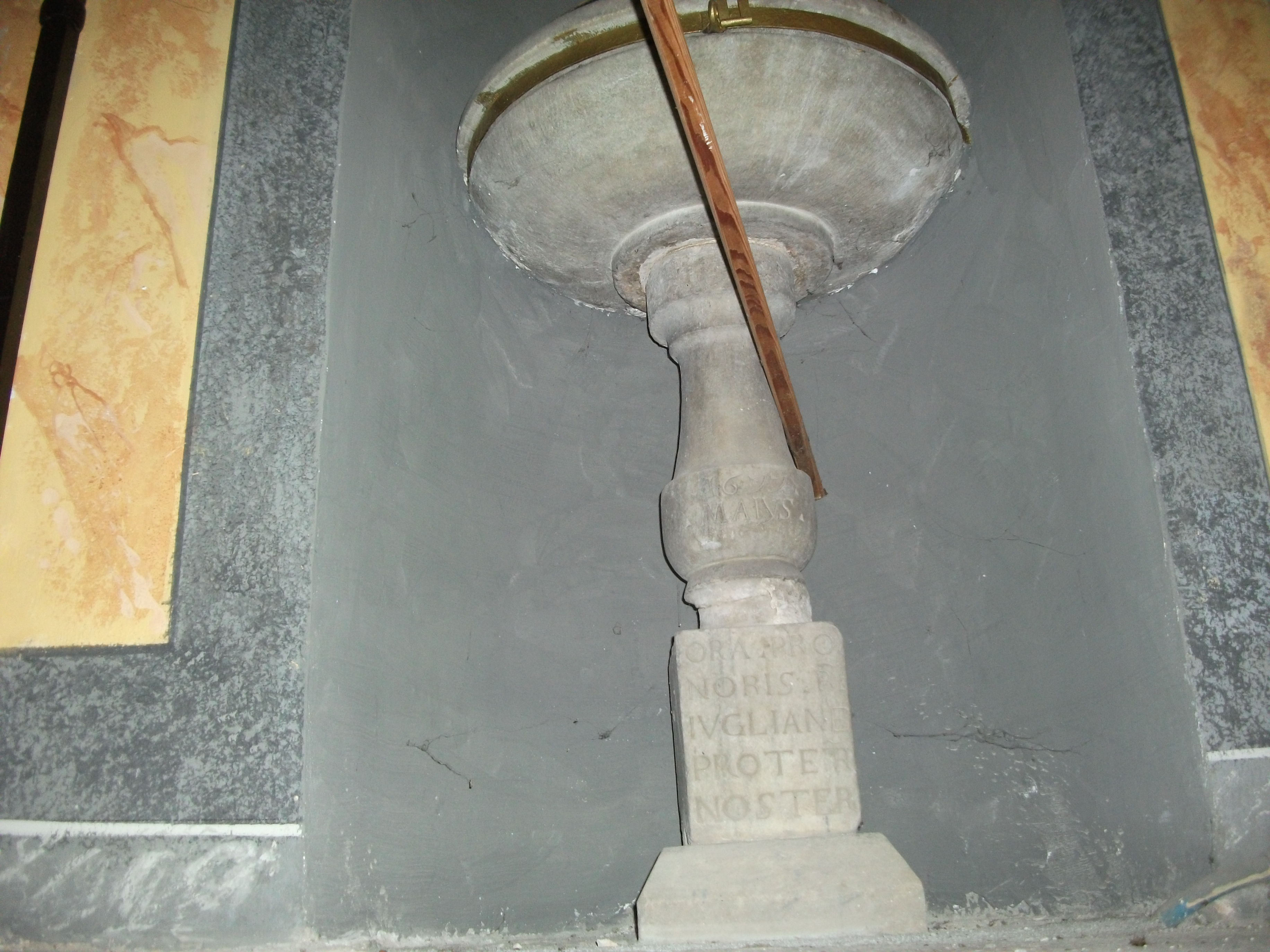 fonte battesimale seicentesco, Barbania